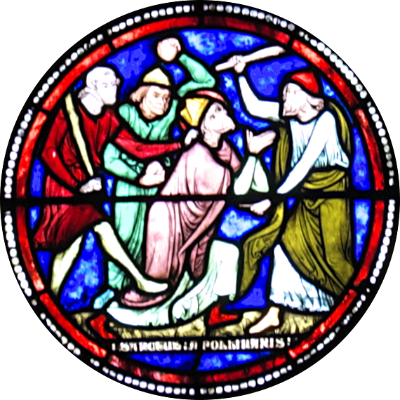 Kathedrale Saint-Pierre-et-Saint-Paul in Troyes im Département Aube (Champagne-Ardenne/Frankreich), Bleiglasfenster im Chor (baie 22) aus dem 13. Jahrhundert, im 19. Jahrhundert restauriert und ergänzt; Darstellung: Szenen aus dem Leben des hl. Apollinaris